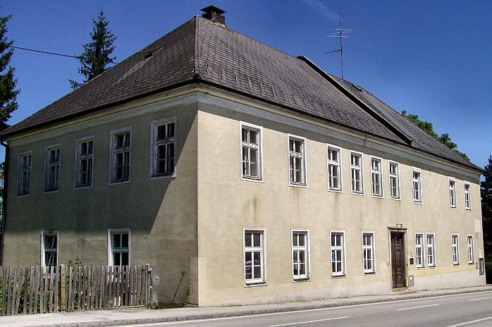 Toleranz-Bethaus in Thening